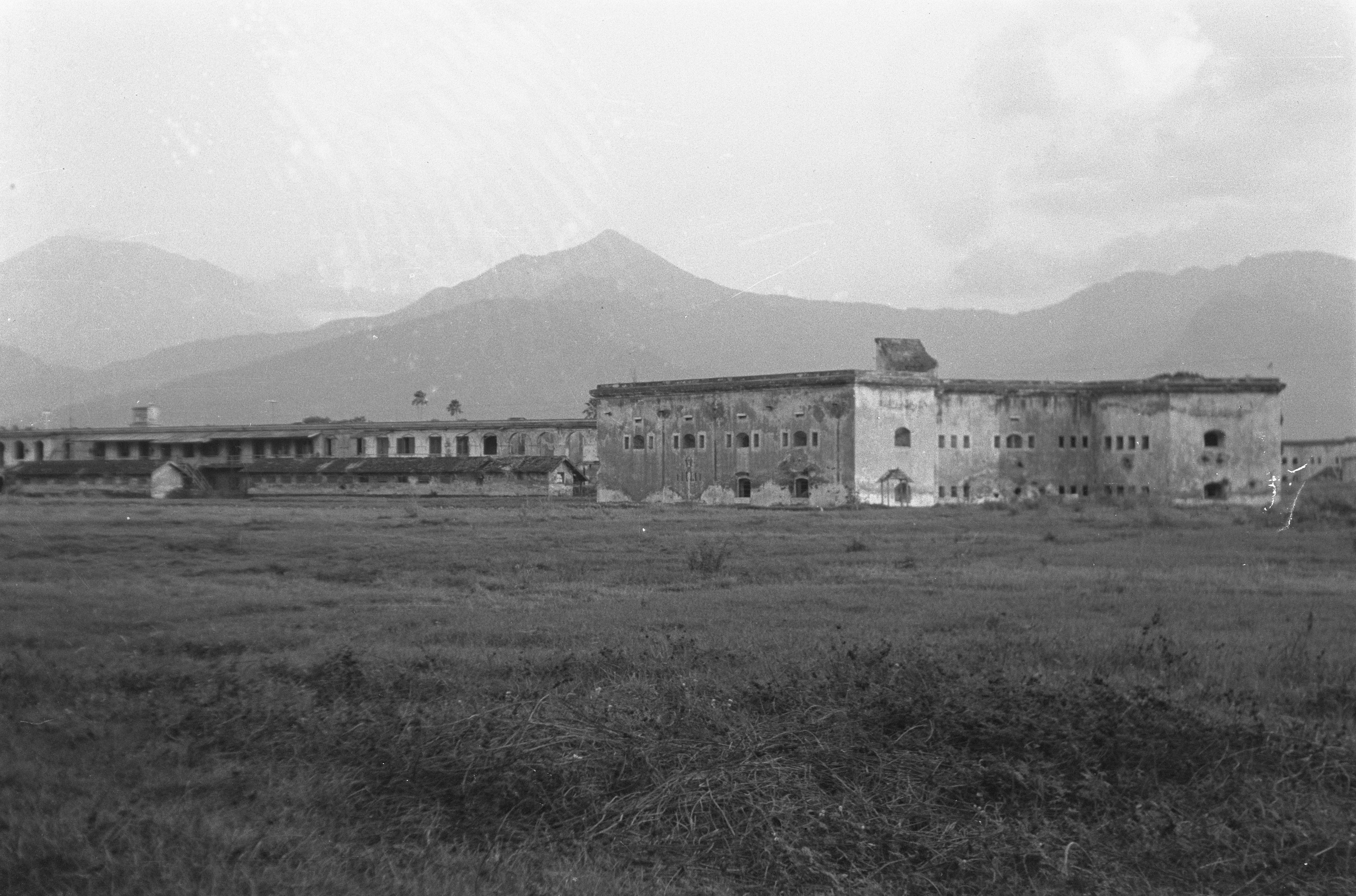 Collectie / Archief : Fotocollectie Dienst voor Legercontacten Indonesië Reportage / Serie : [DLC] Ambarawa Beschrijving : Ambarawa-sector 28-7-47. Het oude fort Willem I te Ambarawa Datum : 28 juli 1947 Locatie : Ambarawa, Indonesië, Java, Nederlands-Indië Fotograaf : Fotograaf Onbekend / DLC Auteursrechthebbende : Nationaal Archief Materiaalsoort : Negatief (zwart/wit) Nummer archiefinventaris : bekijk toegang 2.24.04.02 Bestanddeelnummer : 1681